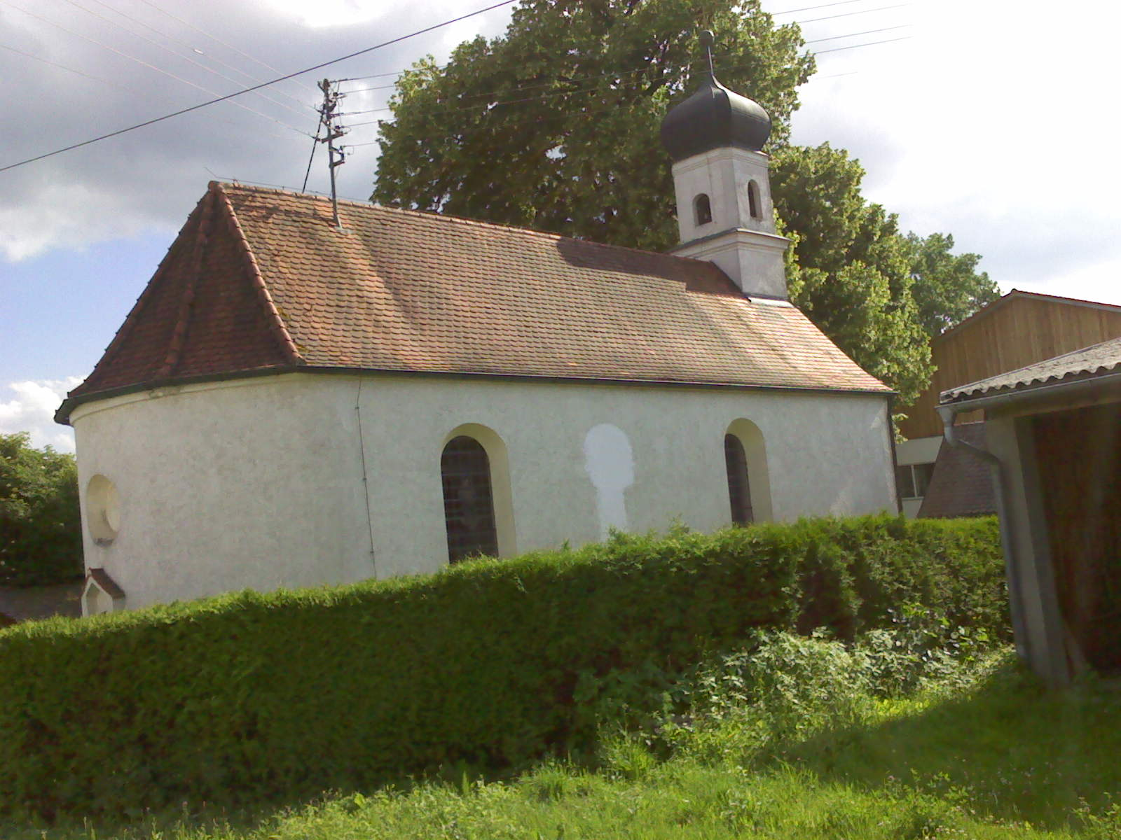 Katholische Filialkirche St. Michael in Schwarzersdorf (Mauern) kleiner barocker Saalbau mit Apsis, Dachreiter und angefügter Sakristei, 1717, erneuert 1869; mit Ausstattung